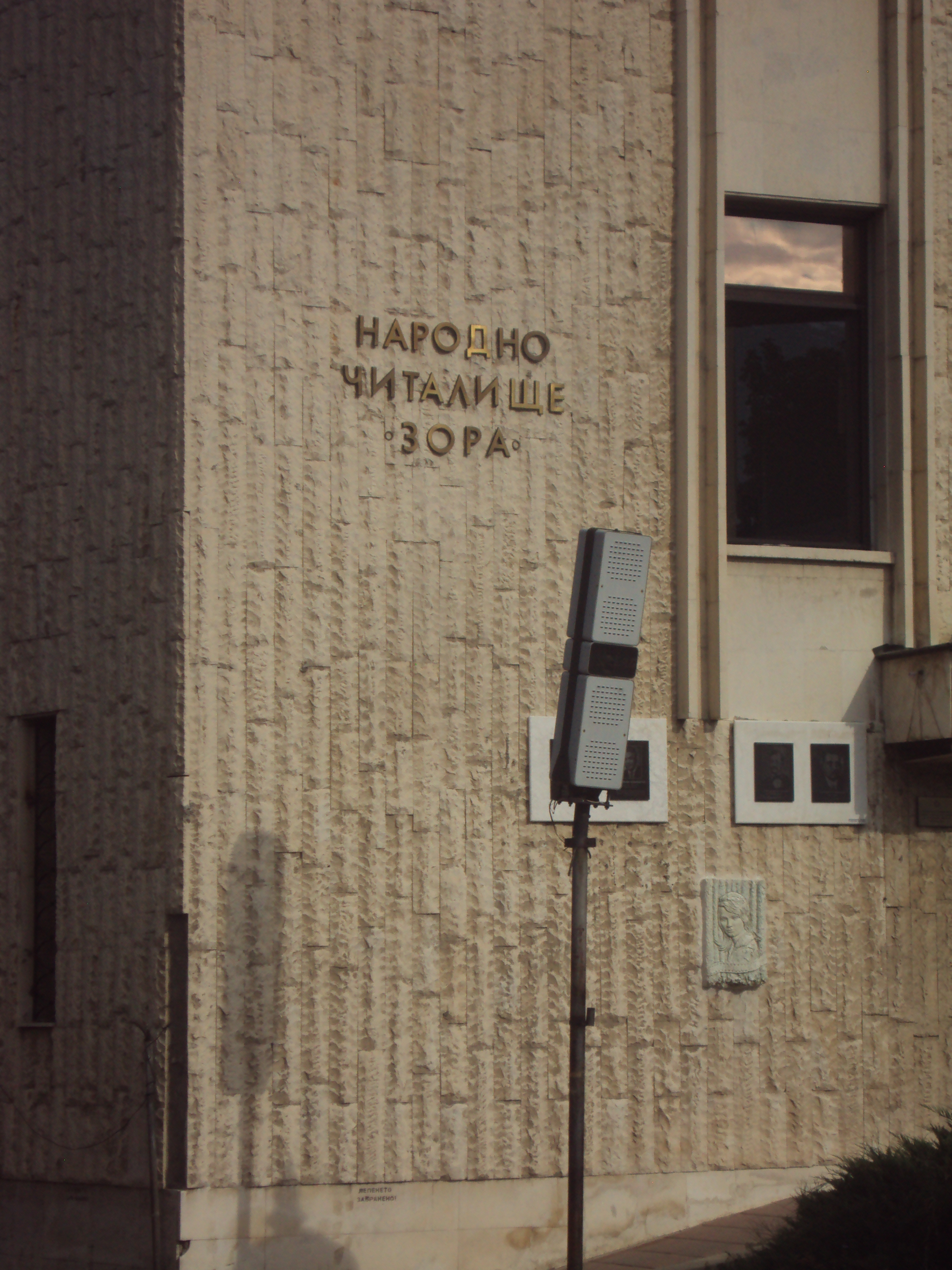 Читалището на Дупница